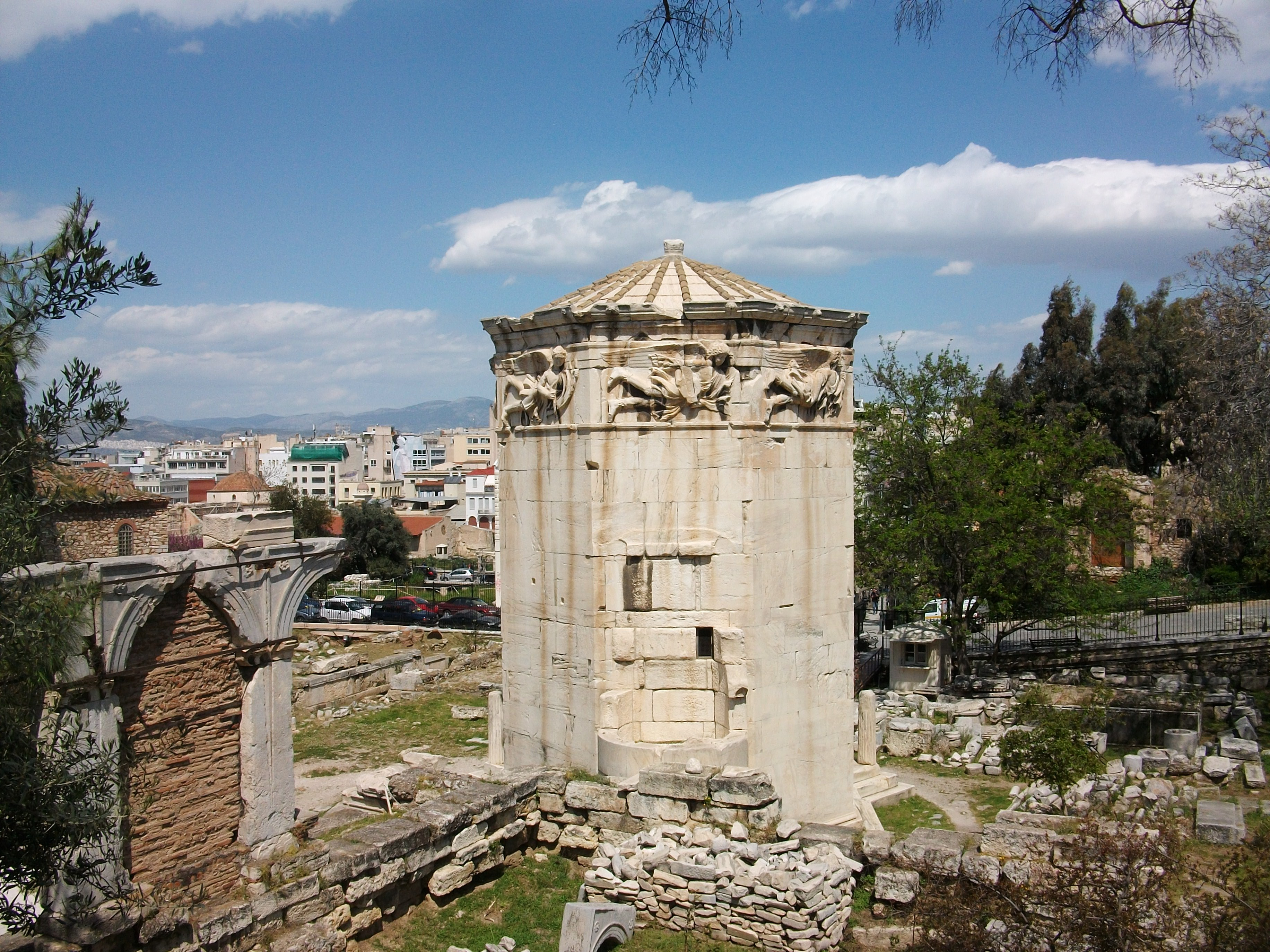 Atenes, torre dels vents.